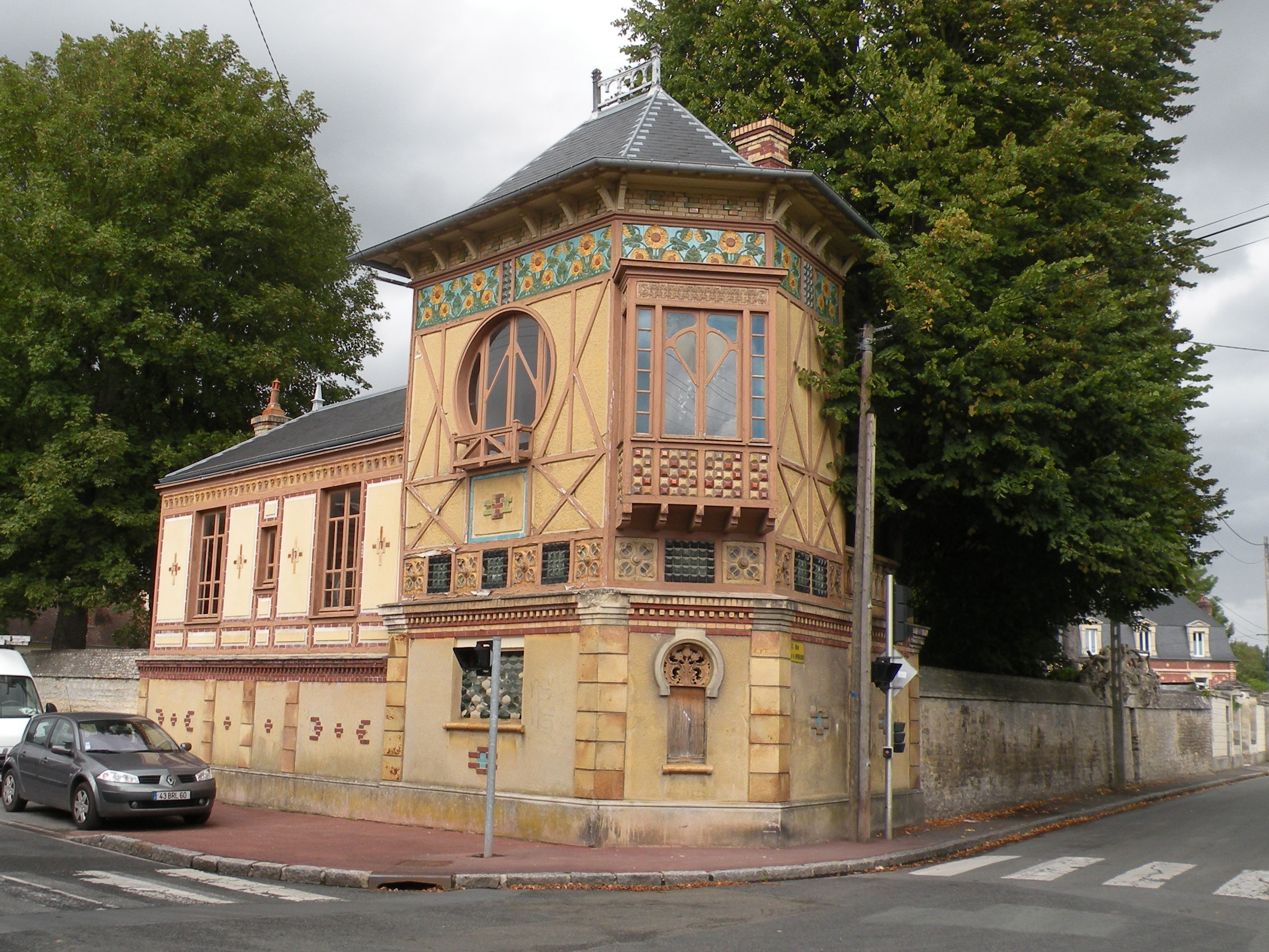 Maison Bordez-Greber (1er quart 20e siècle) à mouy PA00114511